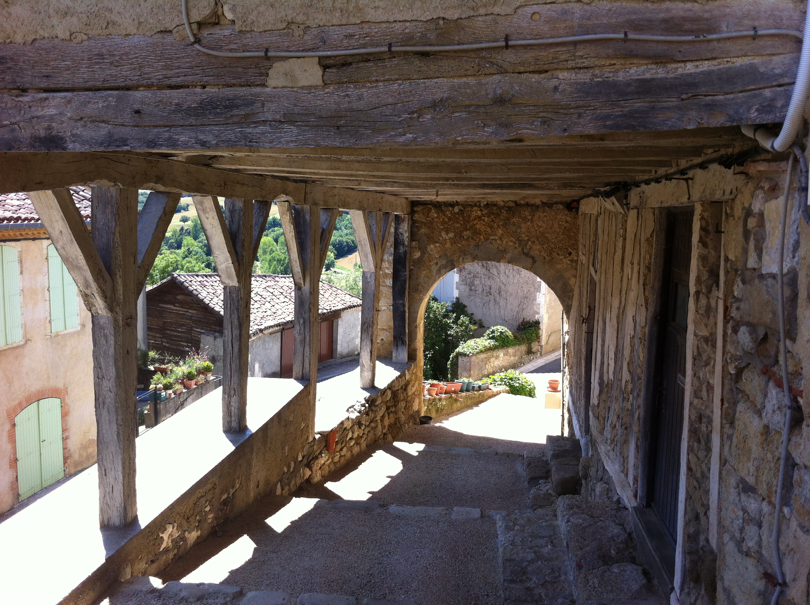 Les embans de Castelnau-Barbarens près d'Auch (Gers)